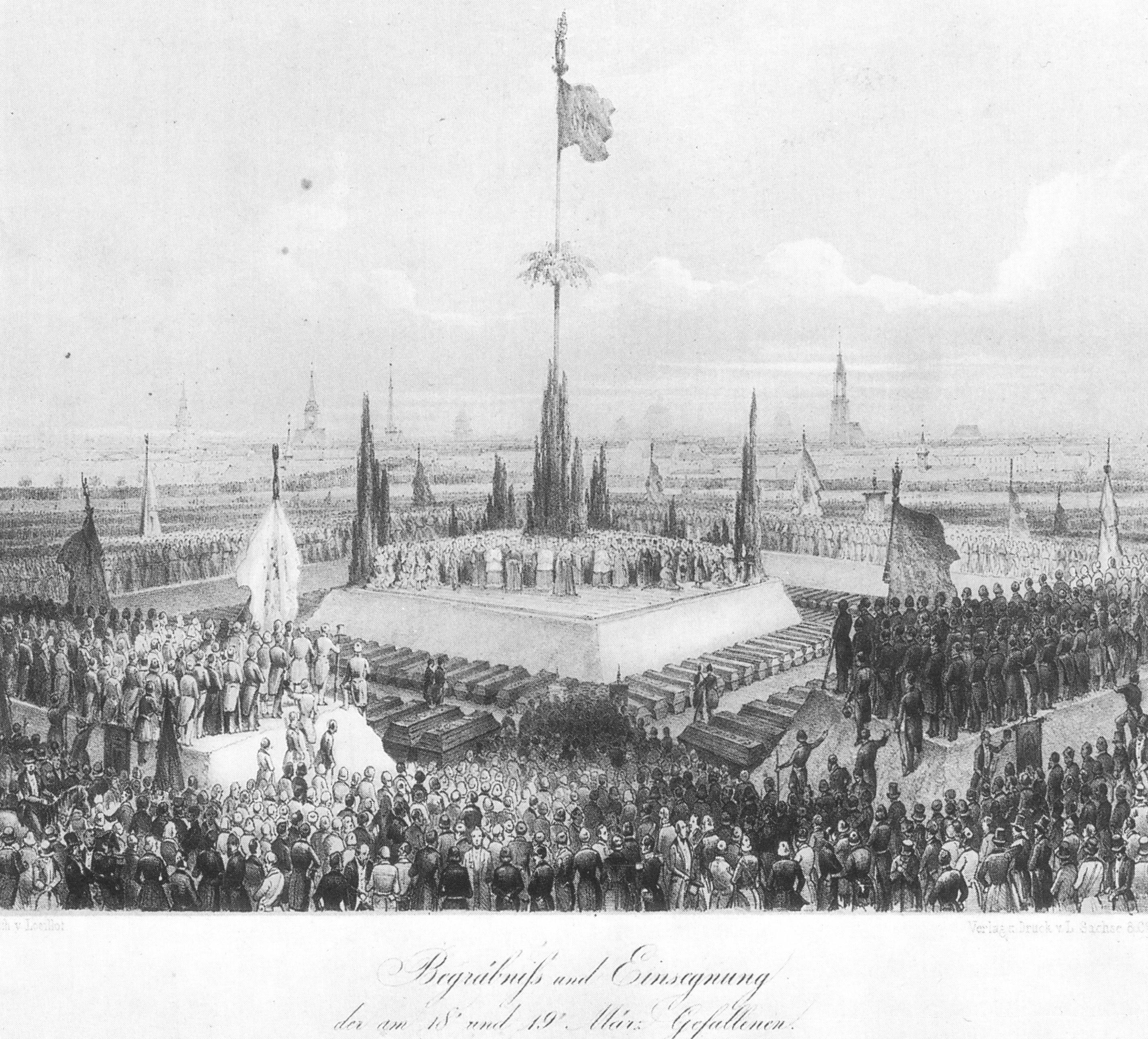 Lithographie, 1848, W. Loillot. “Begräbnis und Einsegnung der am 18. und 19. März 1848 Gefallenen”